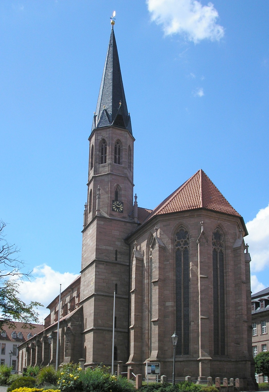 Die Kirche St. Martin in Heiligenstadt (Thüringen).